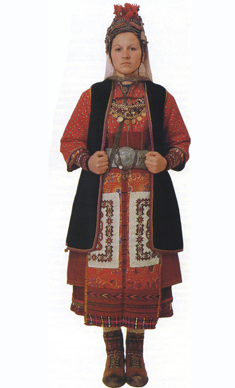 Φορεσιά παντρεμένης από την Άνω Ορεινή Σερρών. Συλλογή Πελοποννησιακού Λαογραφικού Ιδρύματος, Ναύπλιο